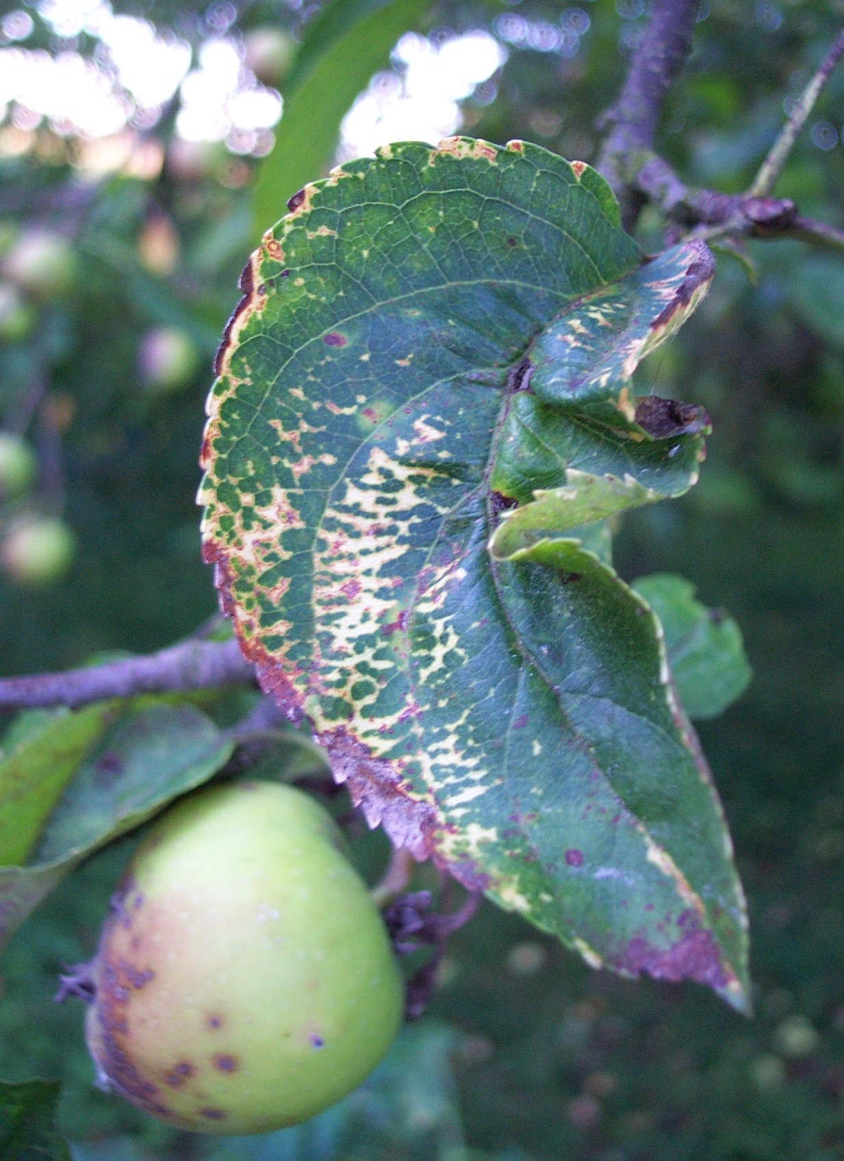 Virová mozaika jabloně, Apple mosaic virus (ApMV) Rostlinolékařská poradna.